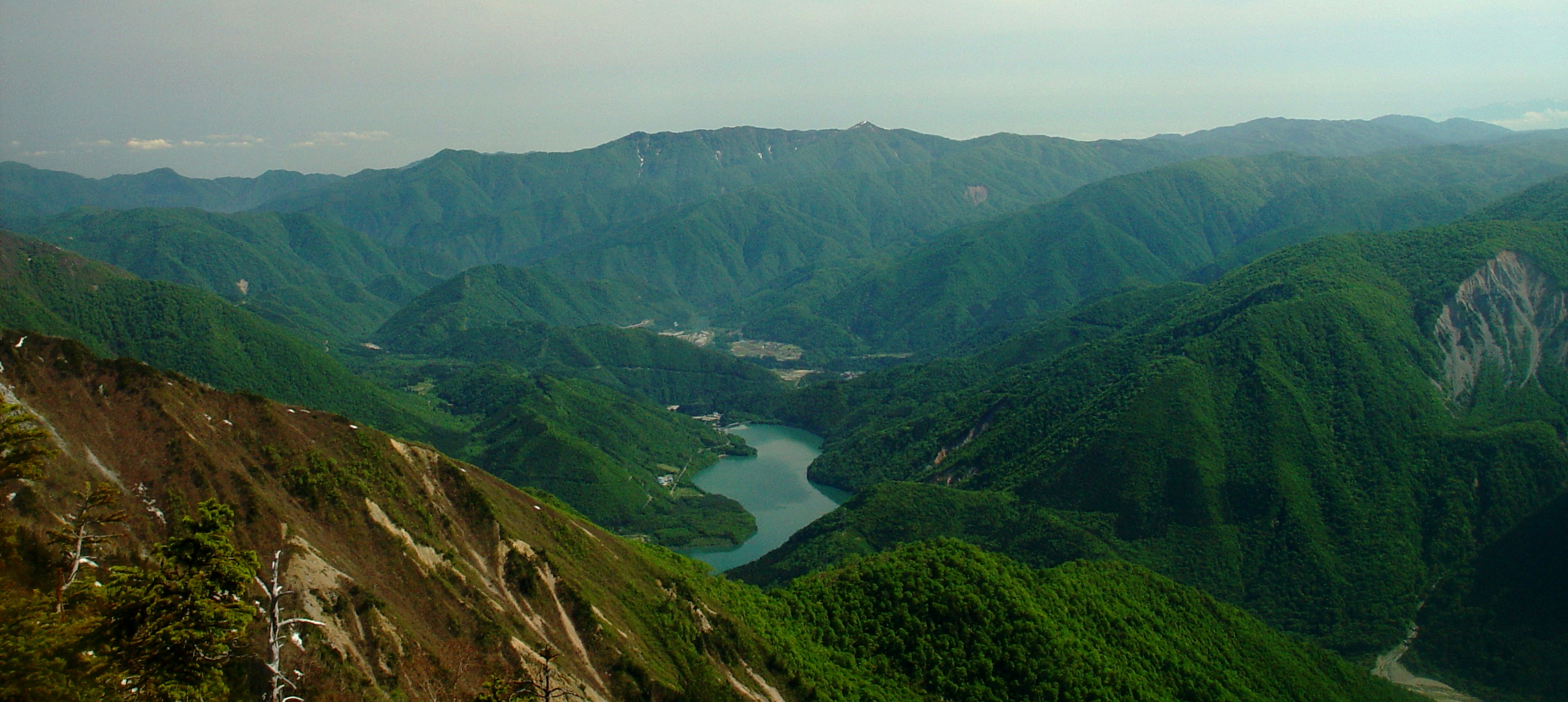 三方崩山から望む鳩谷ダムと白川郷、遠景は人形山